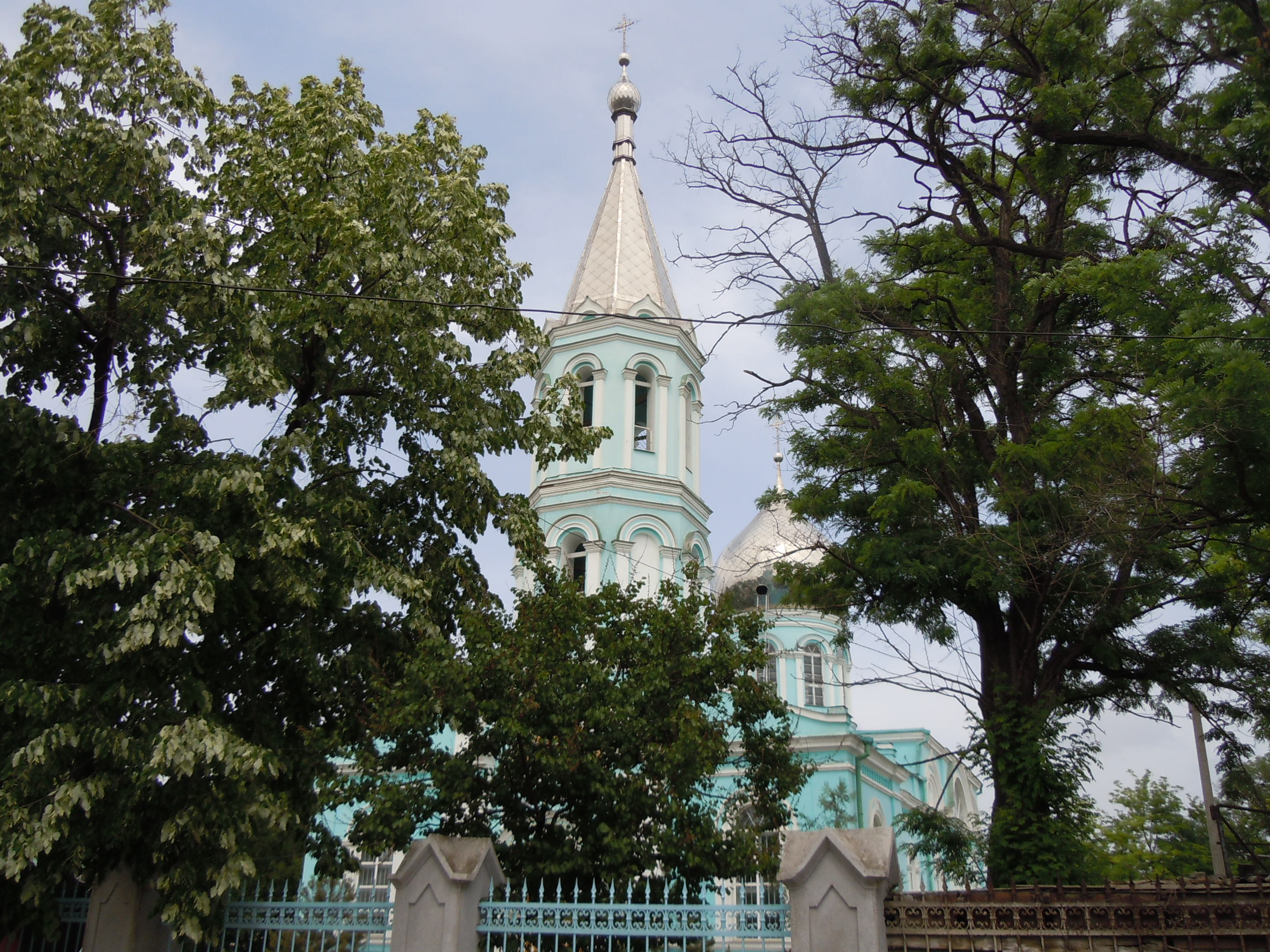 Церква Різдва Богородиці, Слобідка, Одеса